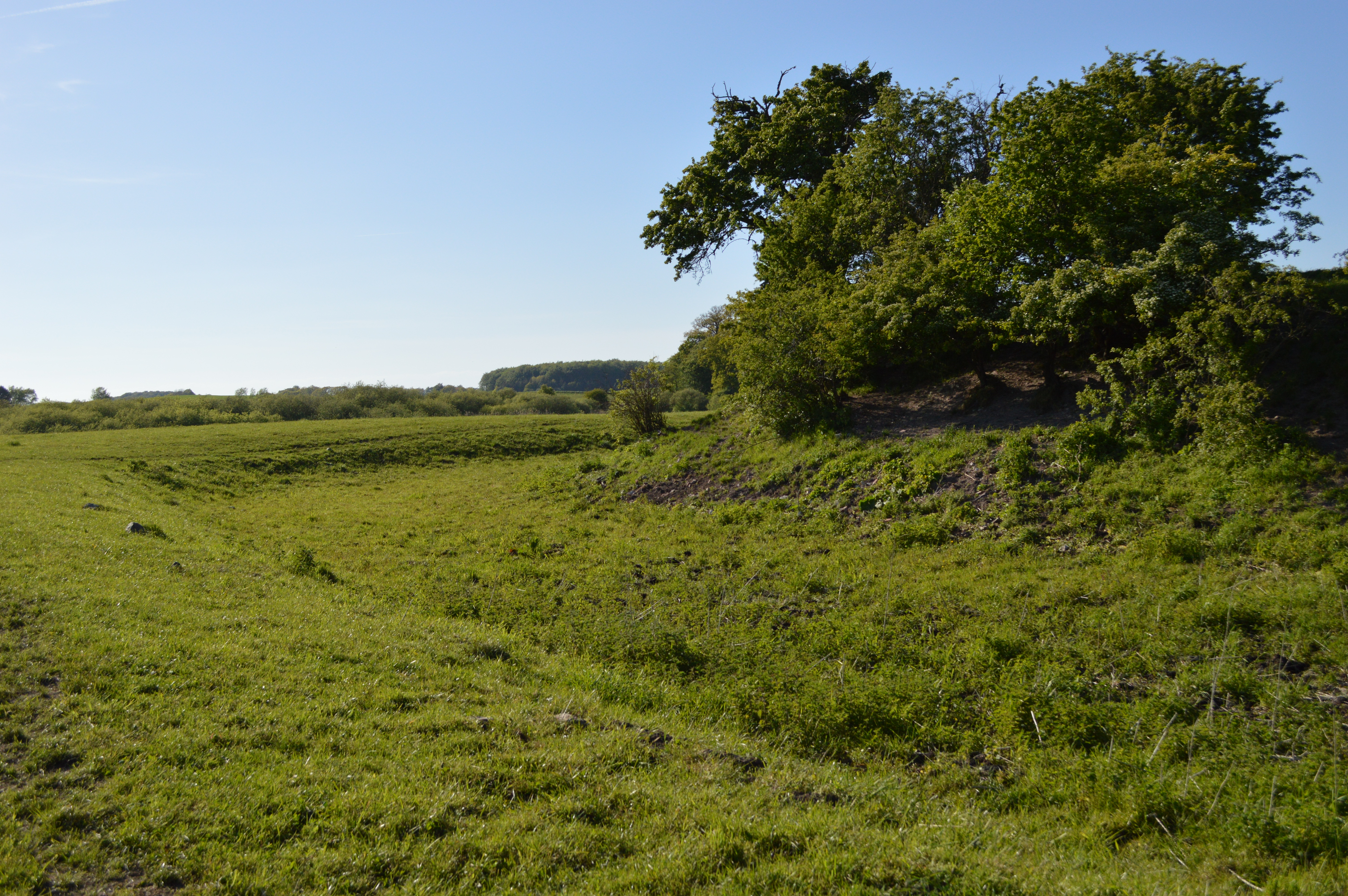 Nedsänkning i marken där vallgraven har legat